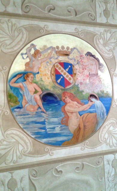 Affreschi palazzo Torlonia di Avezzano